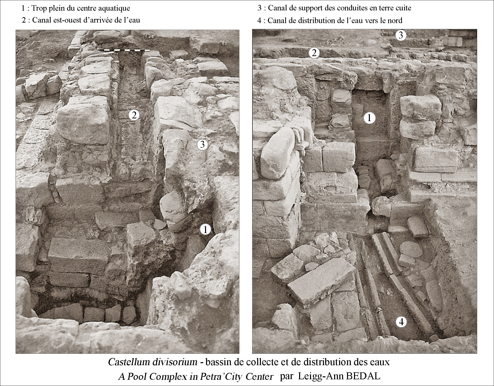 Le collecteur répartiteur d’alimentation du complexe aquatique. D'après : Petra. A pool Complex in Petra’s City Center de Leigh-Ann Bedal.